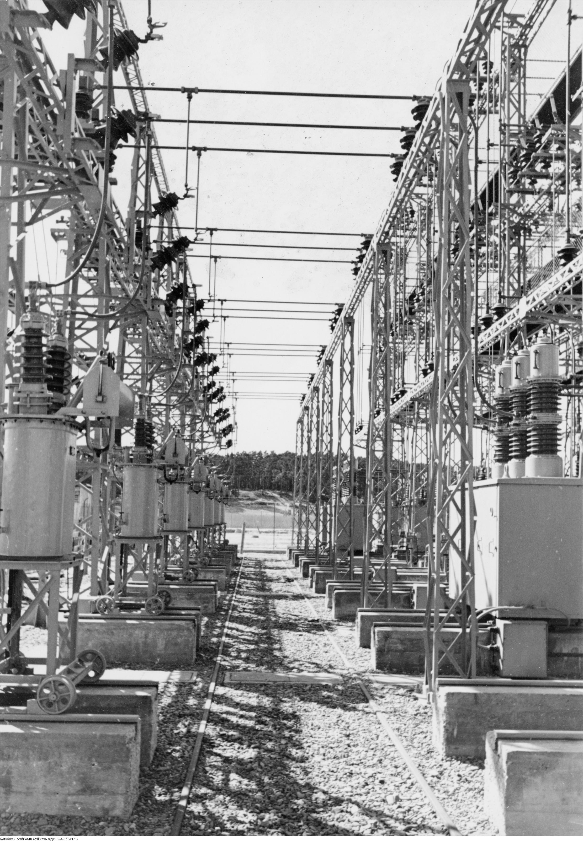 Fragment elektrowni.